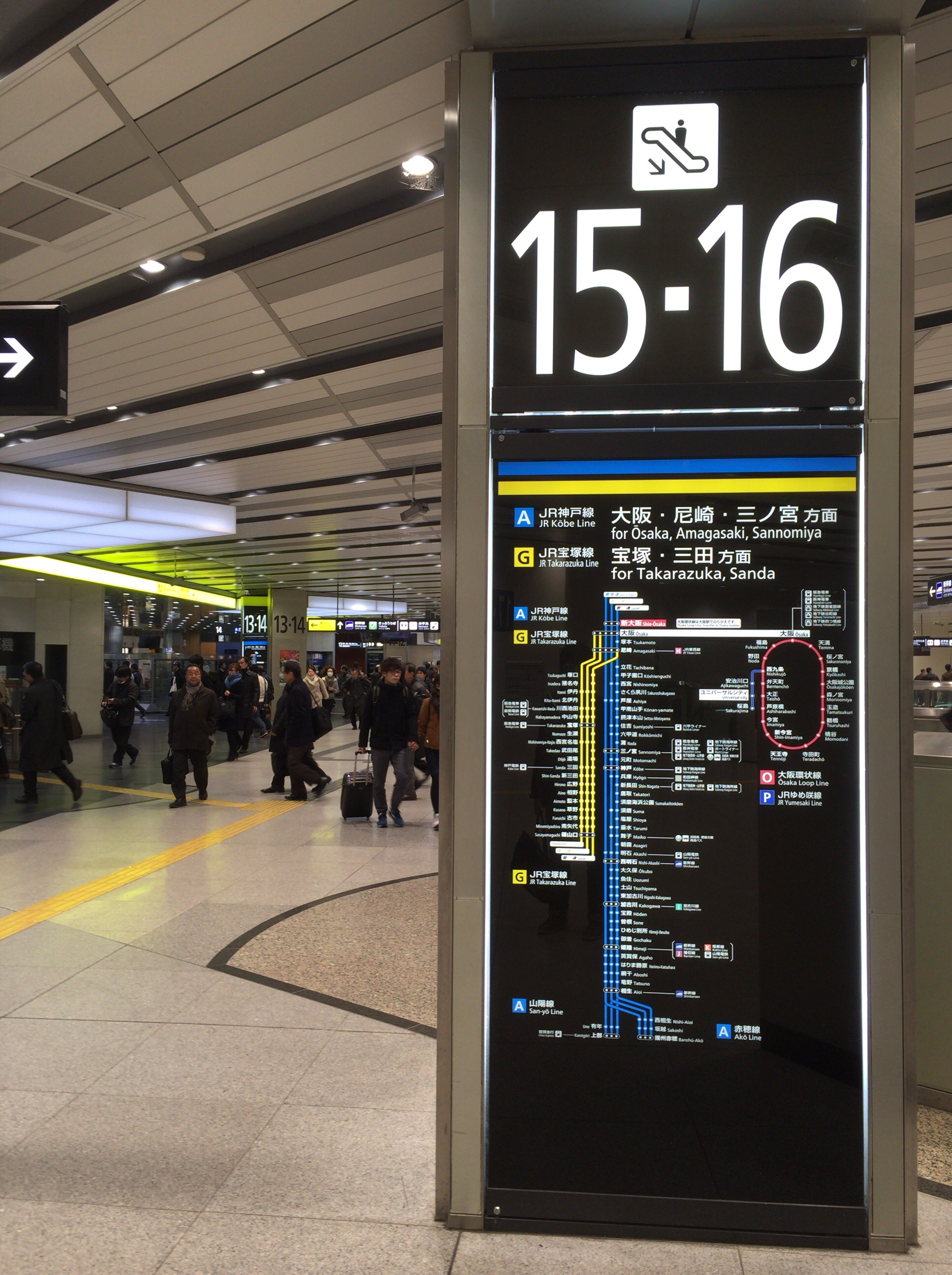 新大阪駅在来線コンコースの案内サイン